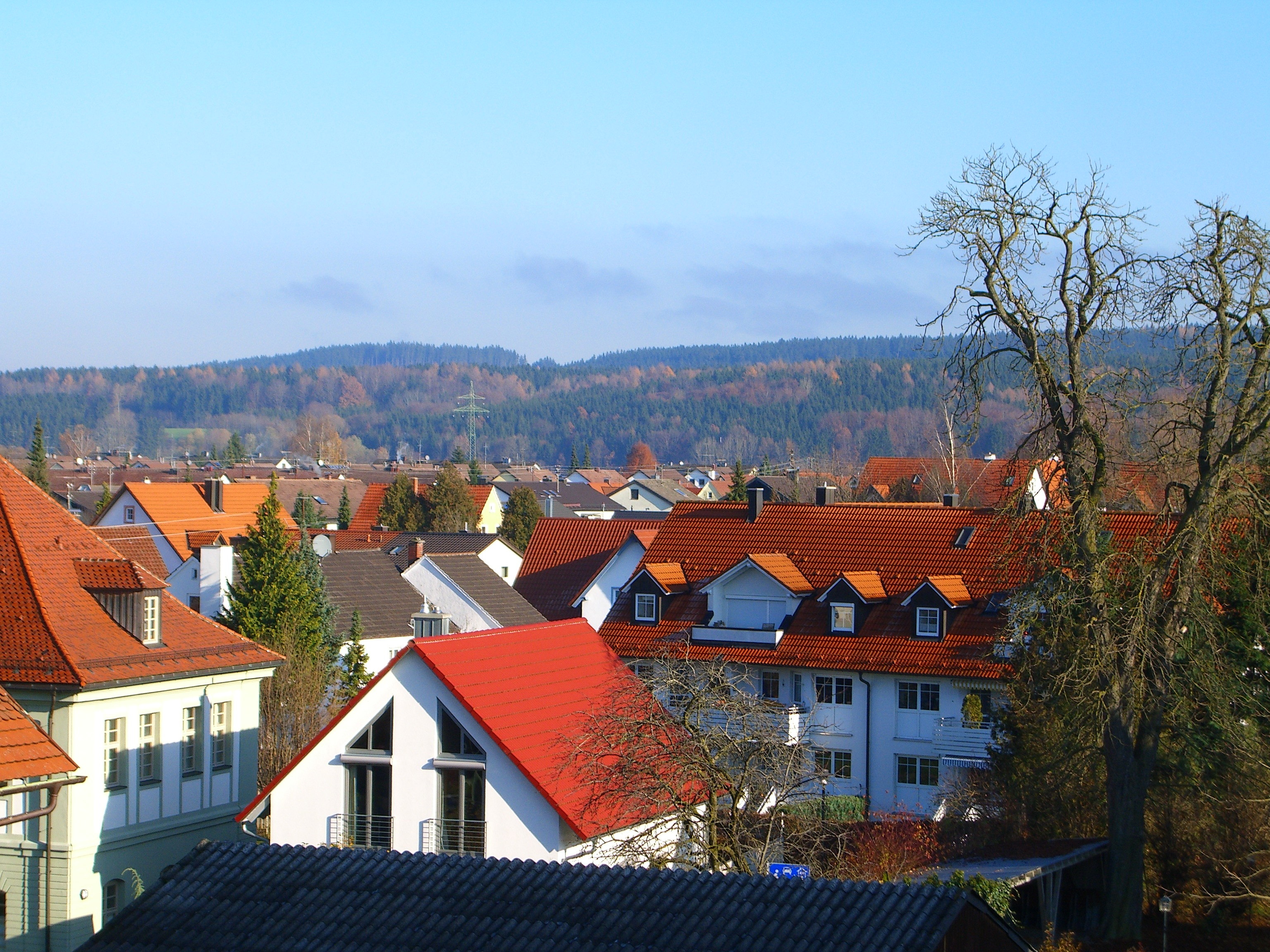 Blick von der Ortsmitte Amendingens zum Nordöstlichen Ortsrand.